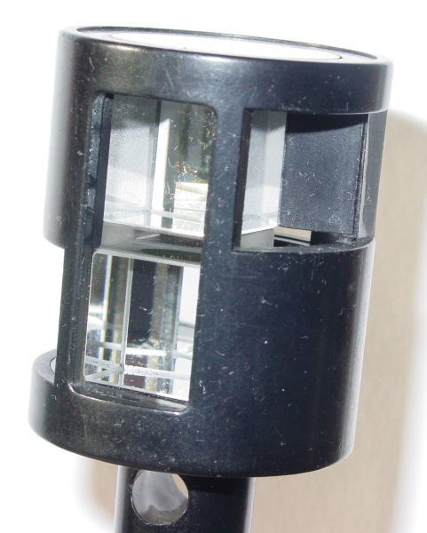 Foto eines Doppelpentaprismas wie es zum Abstecken rechter Winkel bei der Vermessung verwendet wird.